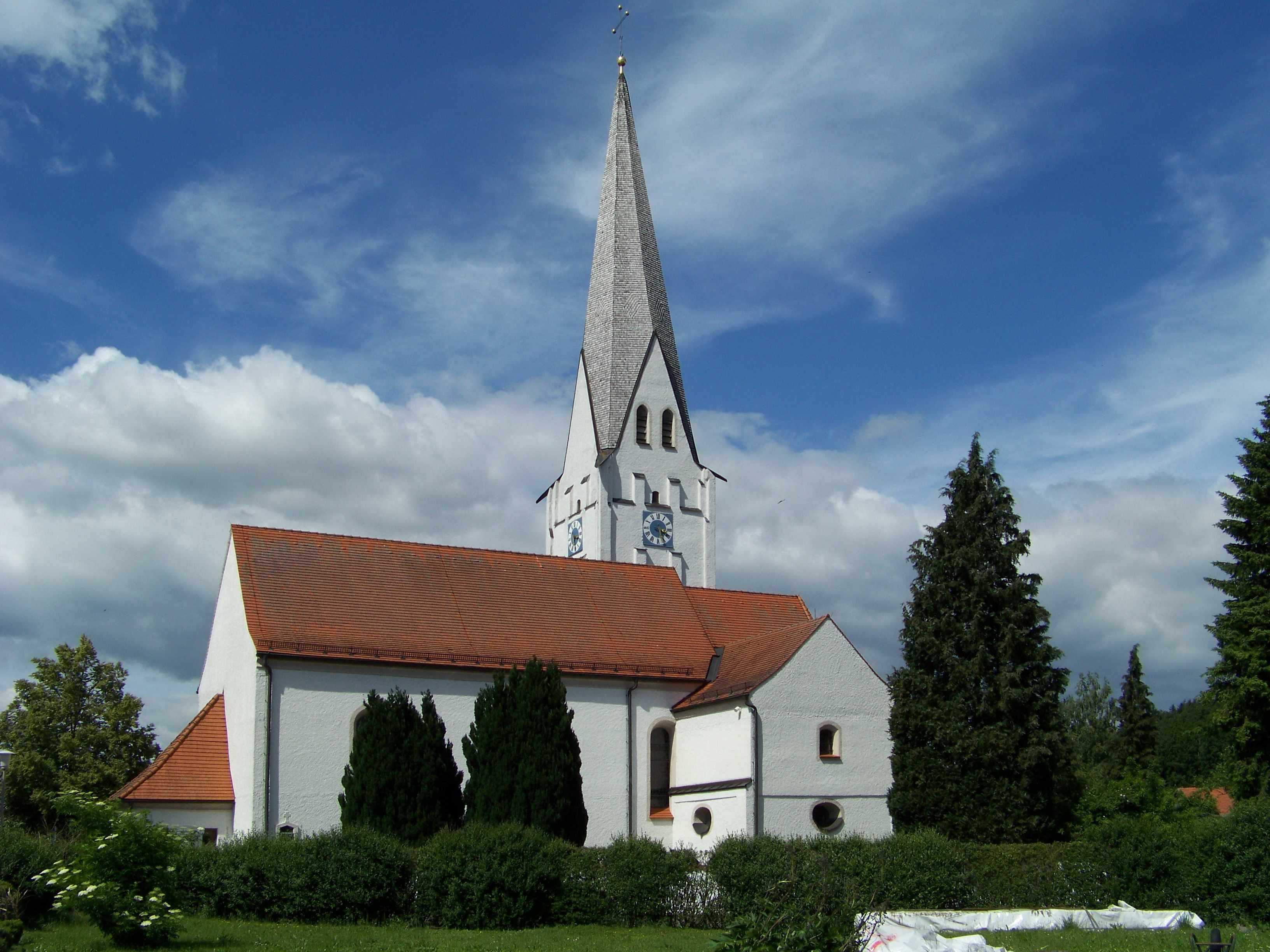 Rottenburg an der Laaber. Inkofen 117. Katholische Pfarrkirche Mariä Reinigung, 2. Hälfte 15. Jahrhundert, barocker Ausbau Mitte 17. Jahrhundert; mit Ausstattung; im Friedhof Seelenkapelle, 18./19. Jahrhundert; mit Ausstattung.